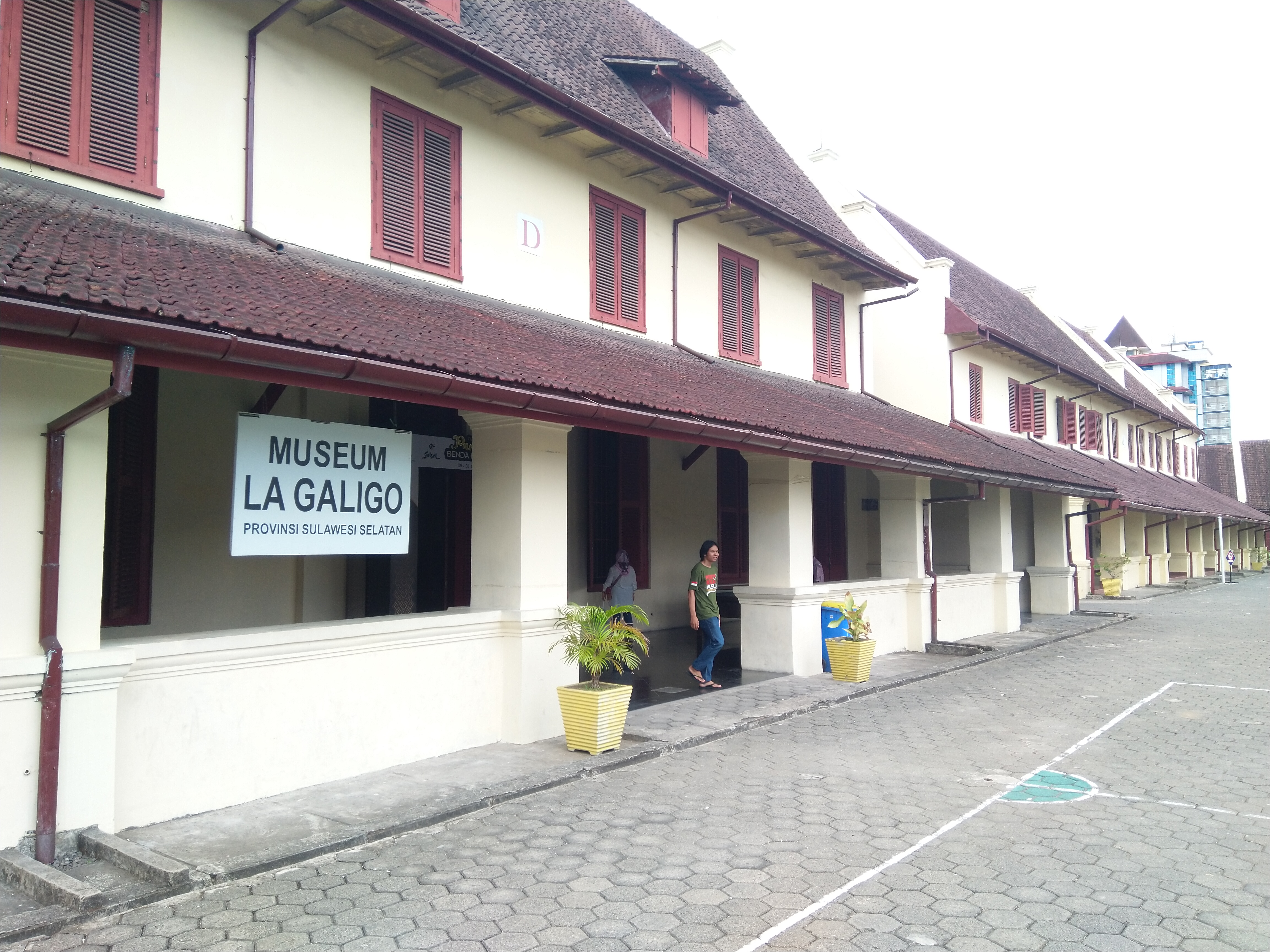 Tampak depan Museum La Galigo, Makassar. Museum yang menempati sebagian gedung di Fort Rotterdam.